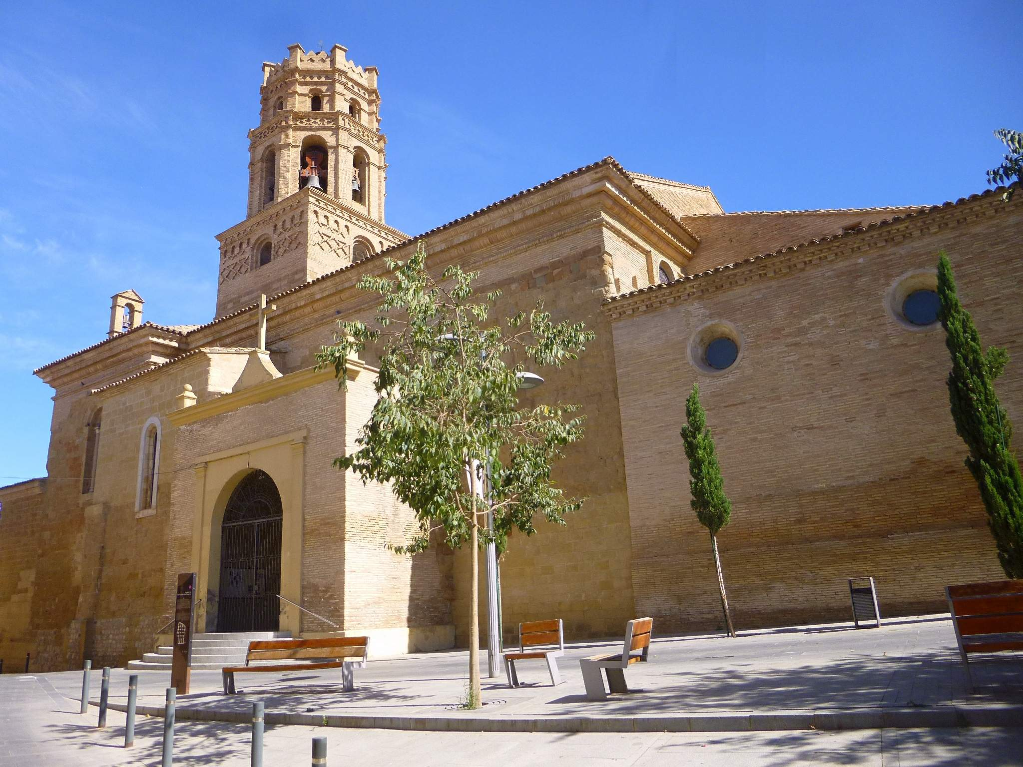 Monzón - Catedral de Santa María del Romeral